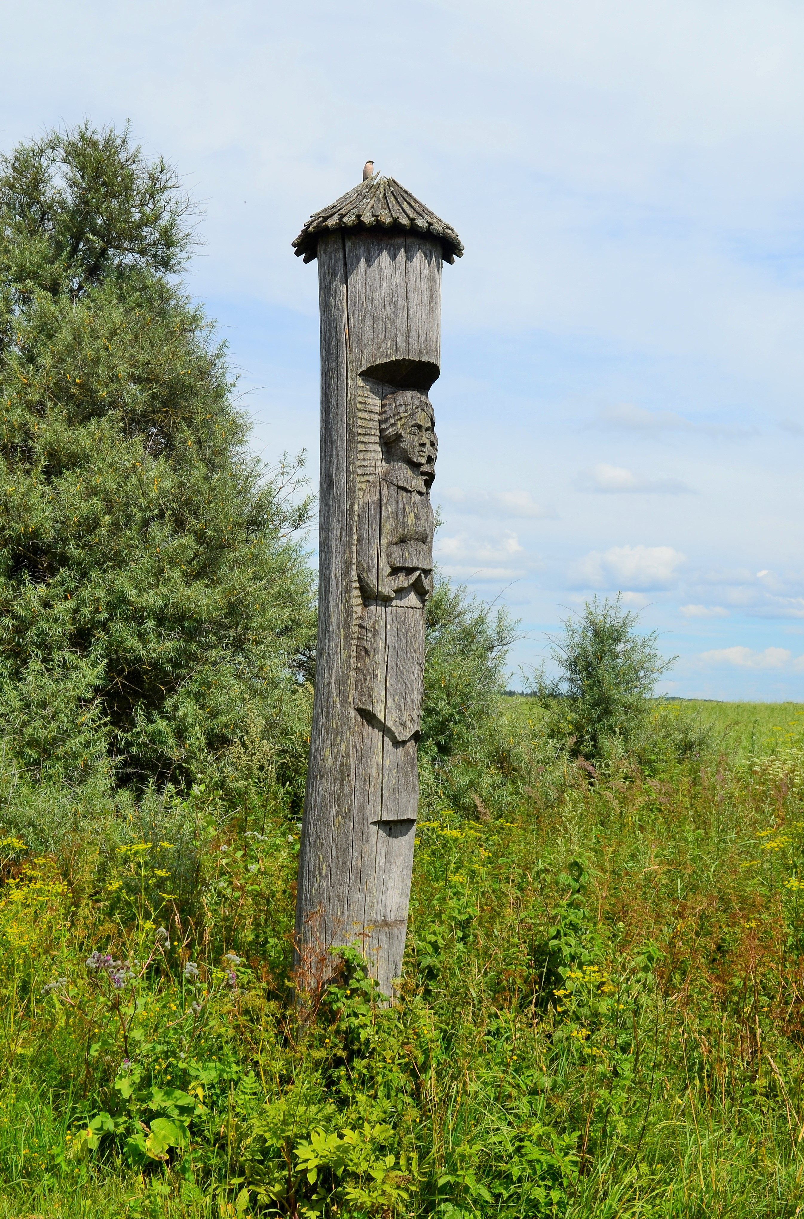 Medinis paminklas, Meilūnai (Siesikų), Ukmergės raj.